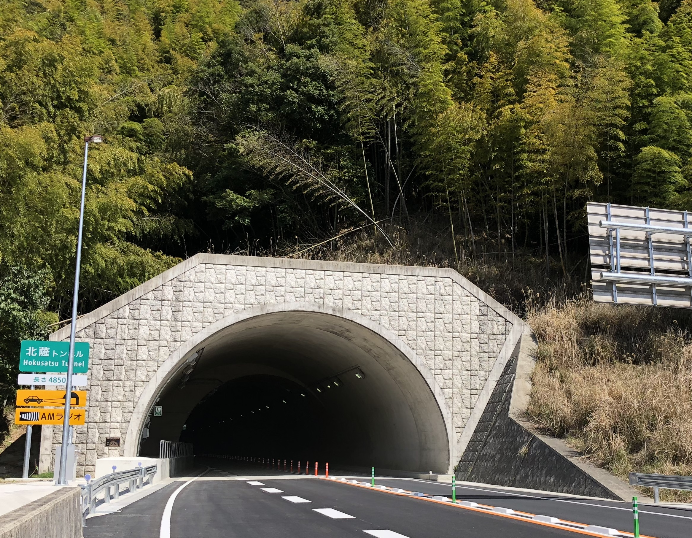 北薩トンネルのさつま町側坑口。自動二輪車備え付けの車載カメラにて撮影。